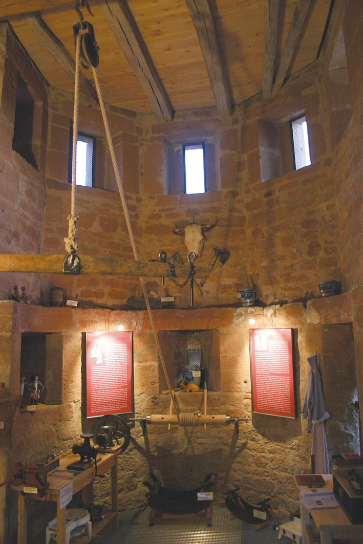 Metzgermuseum im Schlaghaus, Büdingen